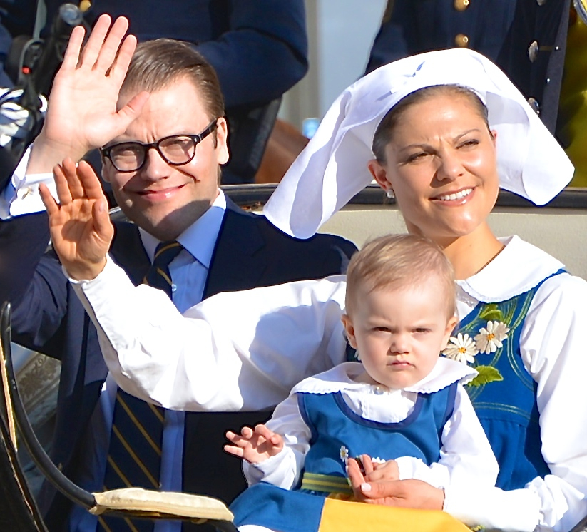 Nationaldagen 2013 i Stockholm.